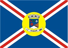 Bandeira da cidade Igarapé, Minas Gerais.